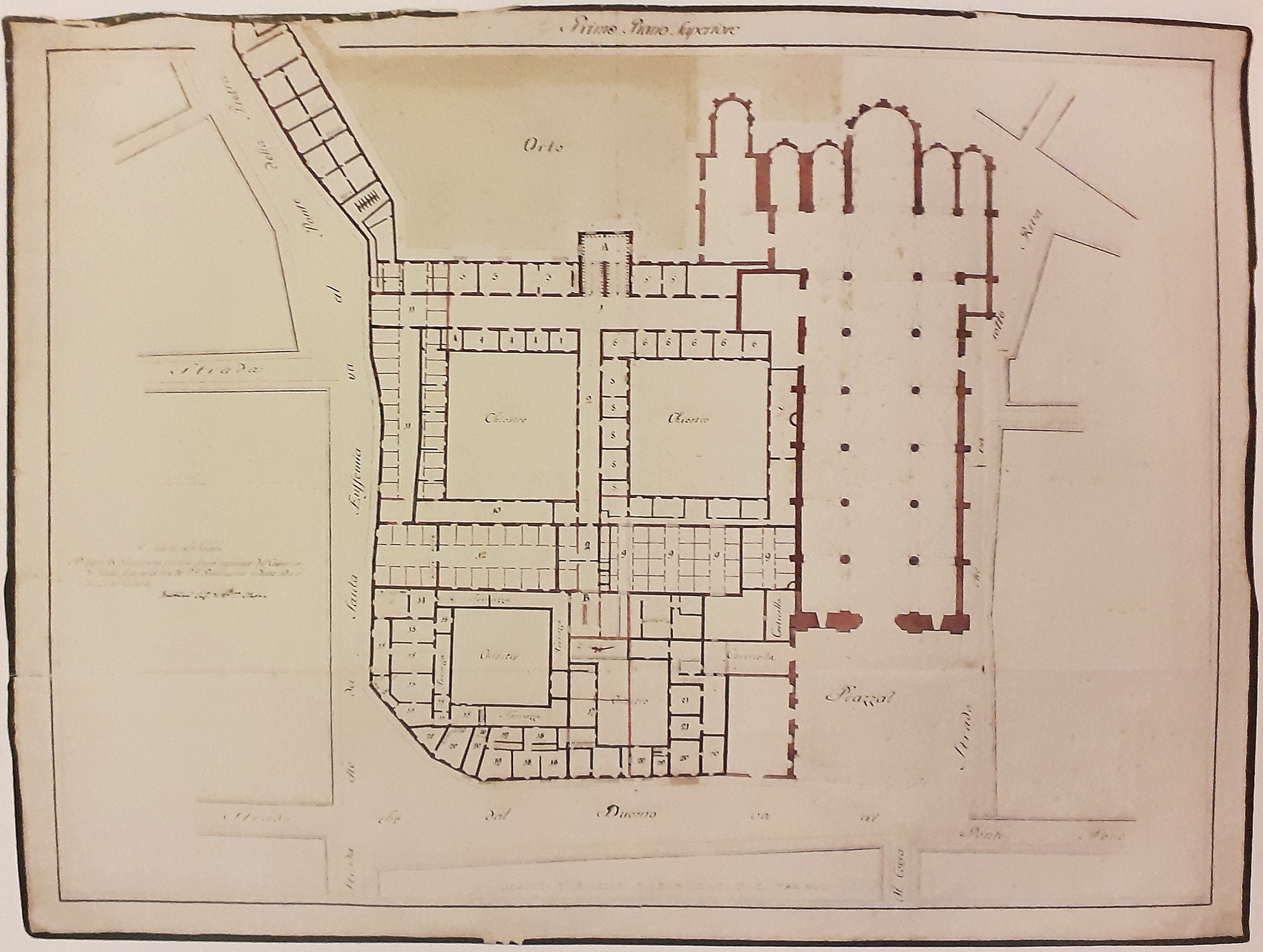 Pianta del convento e della basilica di Santa Anastasia, redatta nel 1807 e custodita nella biblioteca civica di Verona.